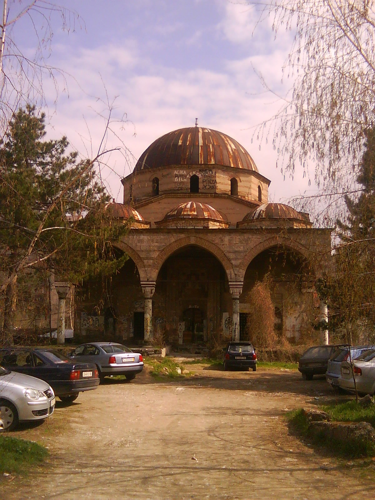 Haydar kadı mosque in Bitola